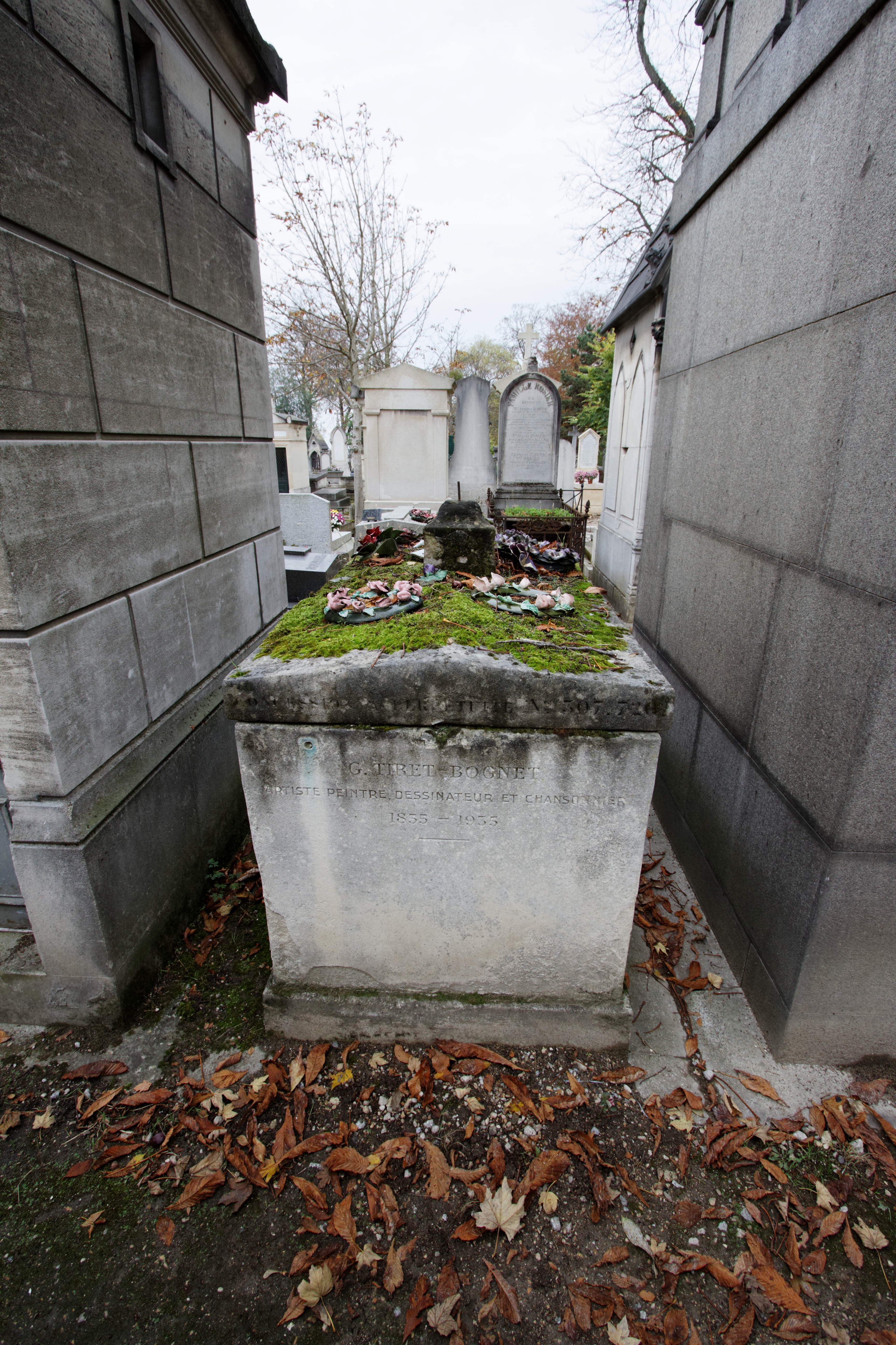 Sépulture de Georges Tiret-Bognet (1855-1935), dessinateur, peintre et illustrateur français.